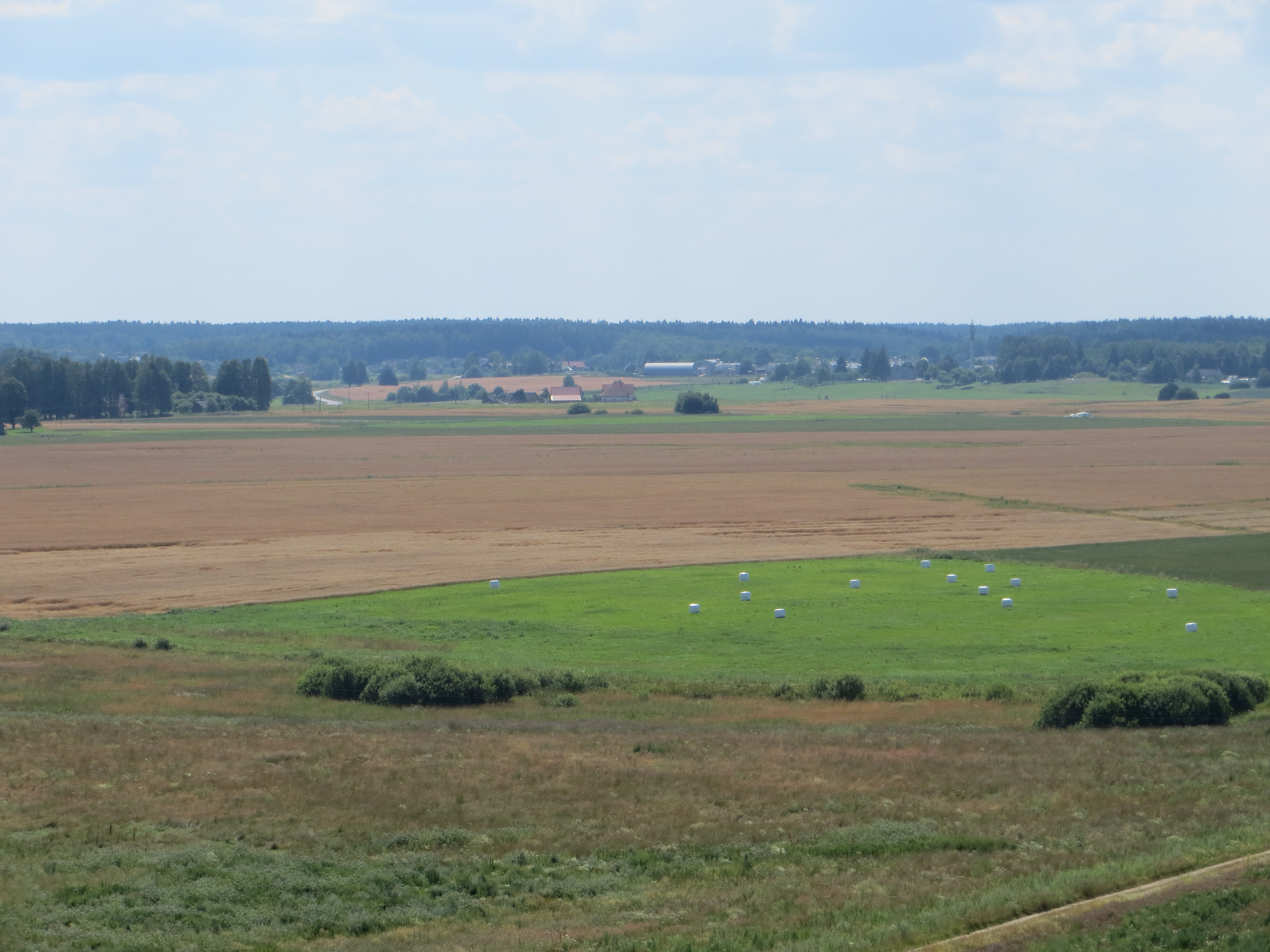 Juodeliai 19131, Lithuania